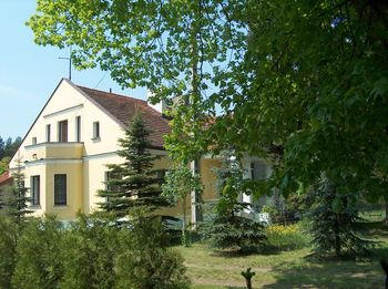 dom w Otłoczynie jestem autorem zdjęcia